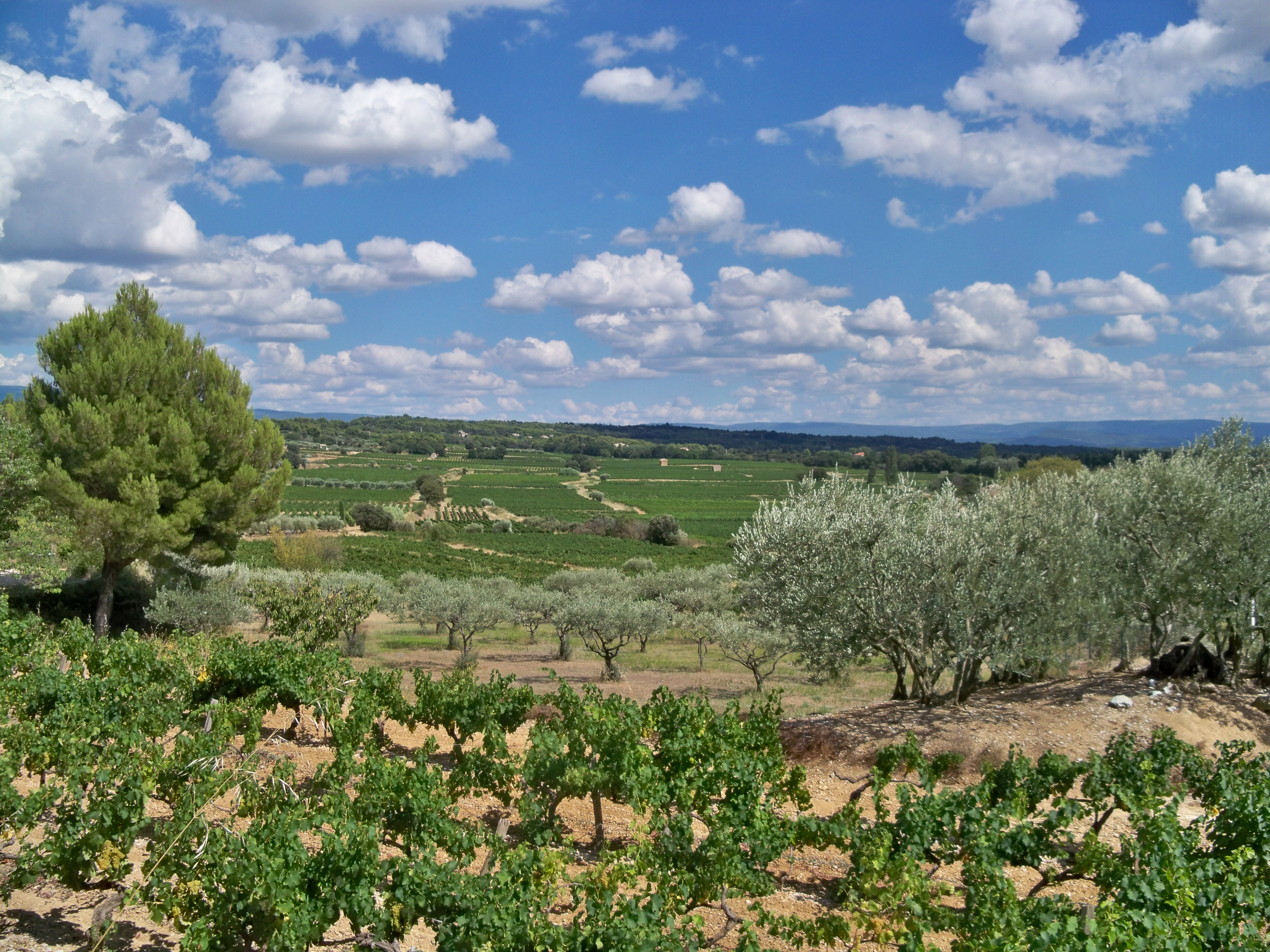 Oliviers et Vignobles sur la communes de Beaumes de Venise, Vaucluse, France